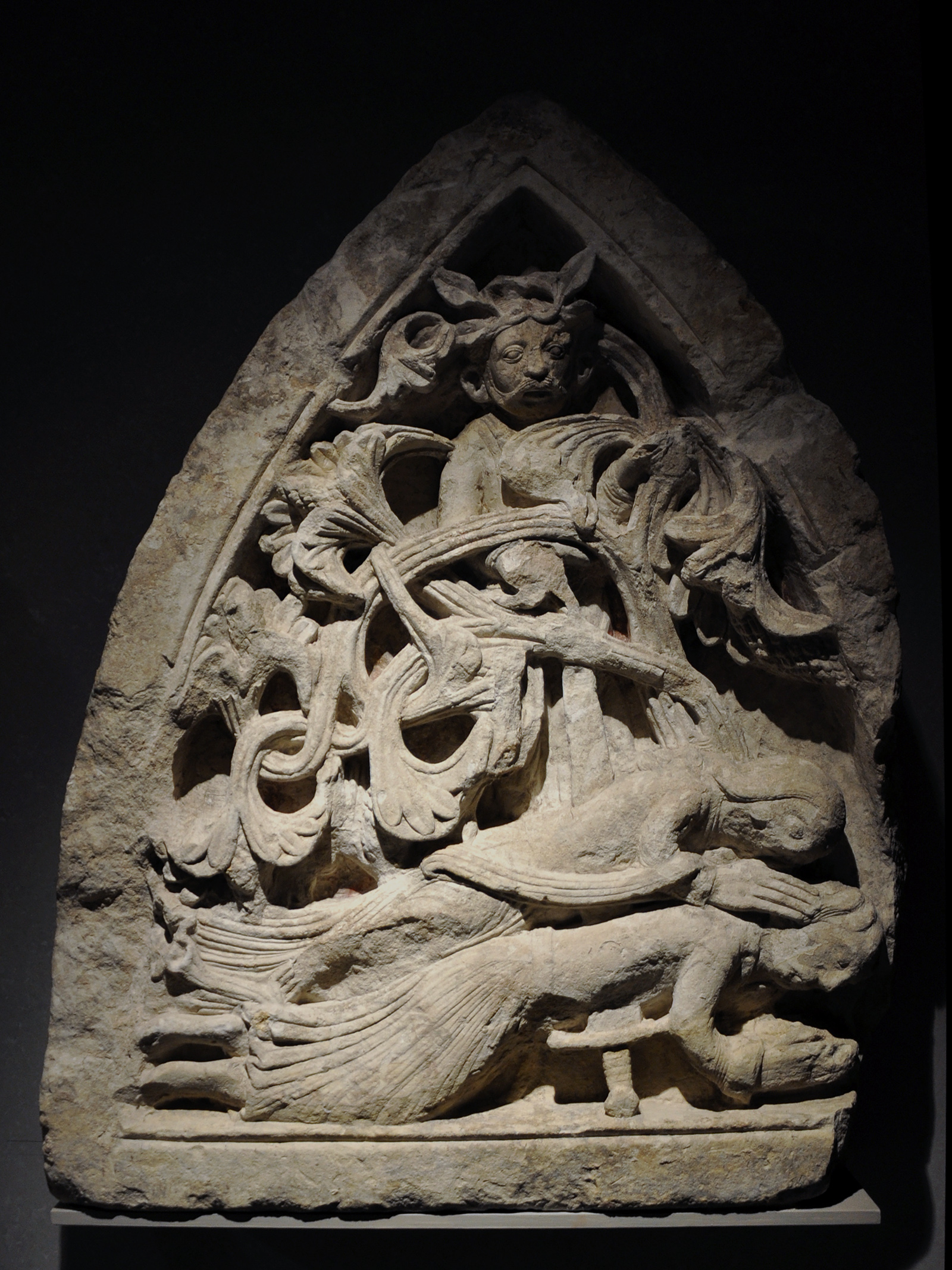 Pyrame et Thisbé, pierre, tympan provenant de l'abbaye de Saint-Géry au Mont des boeufs et trouvé en 1896 dans les fondations de la chapelle de l'hôpital Saint-Jacques-au-Bois; 2ème moitié du 12ème siècle. Musée des Beaux-Arts de Cambrai.